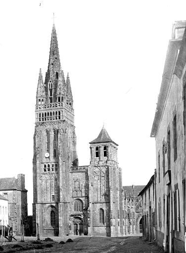 Vue d'ensemble de l'église de Le Folgoët (Finistère, France) par l'Ouest.